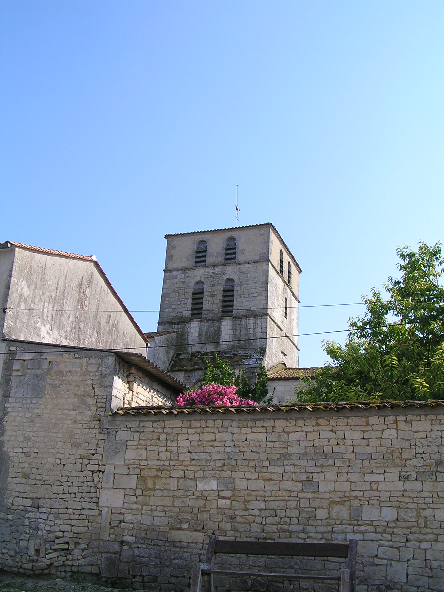 église de Chassors (St-Romain, prieuré bénédictin), Charente, France